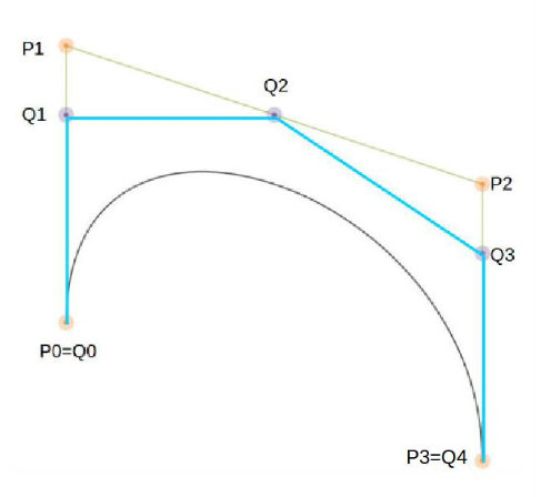 Povecanje stepena krive